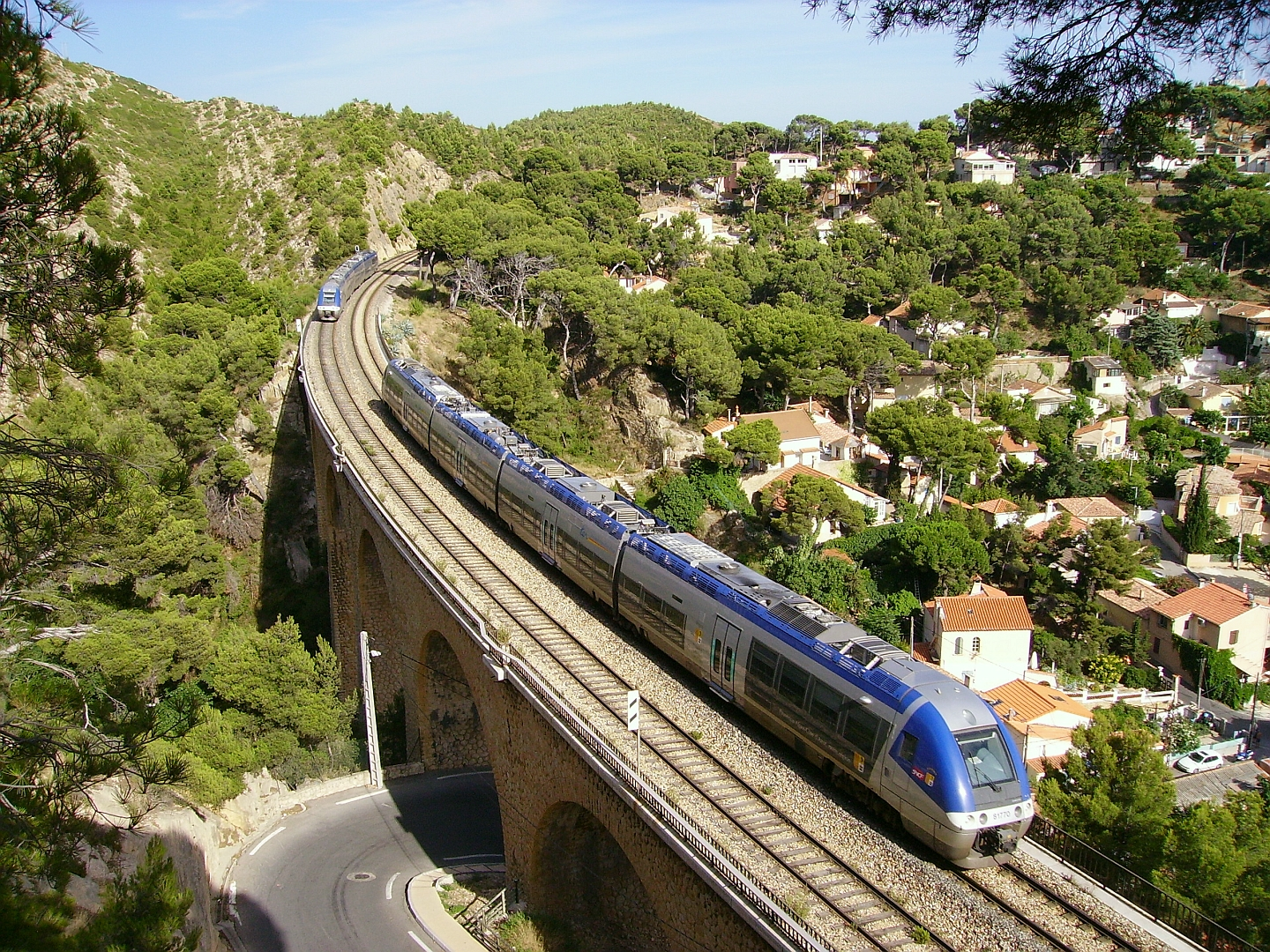 Croisement de deux TER Marseille Miramas sur le viaduc de La Redonne le 24 juillet 2010.